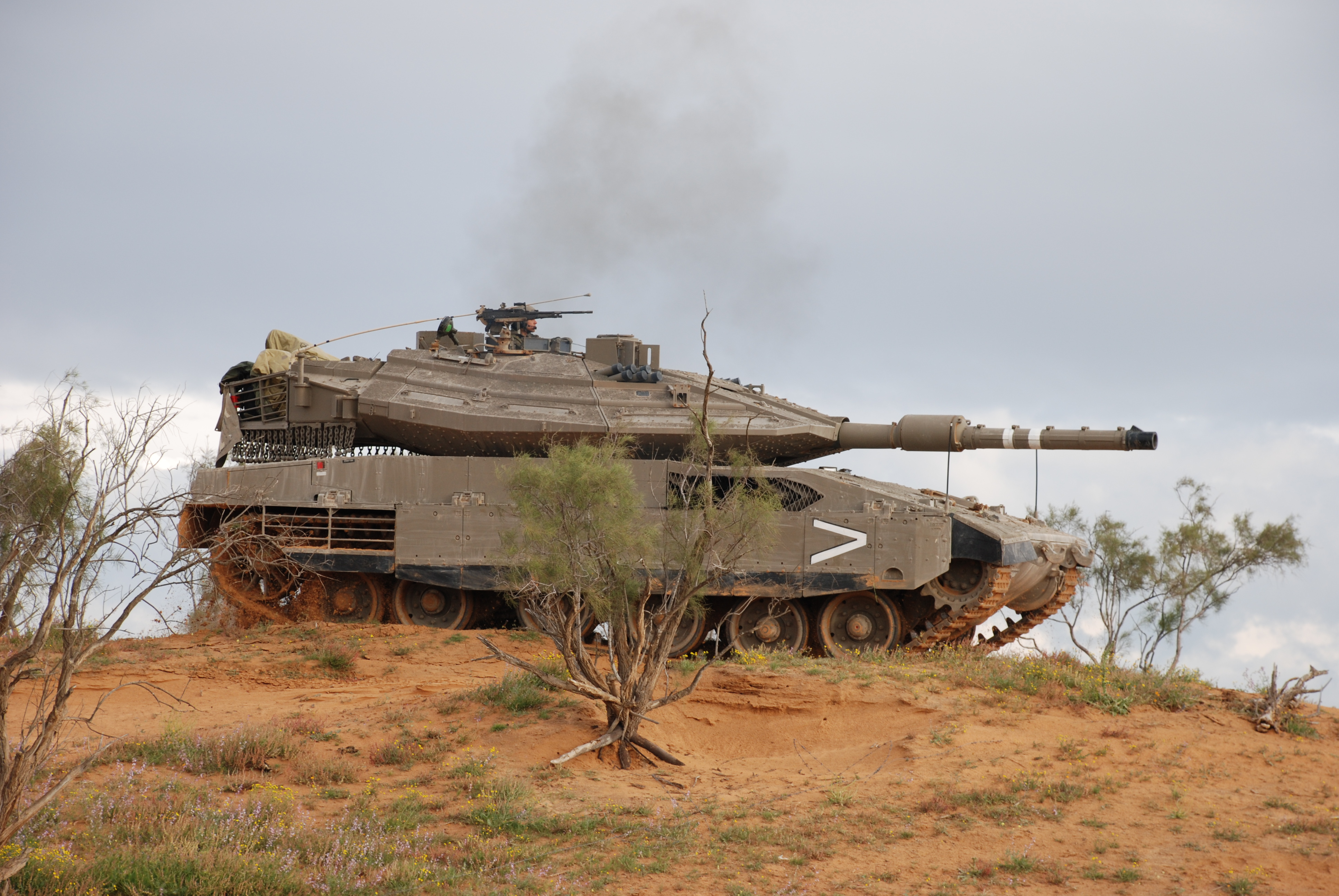 IDF Merkava Mark IV tank טנק מרכבה סימן 4